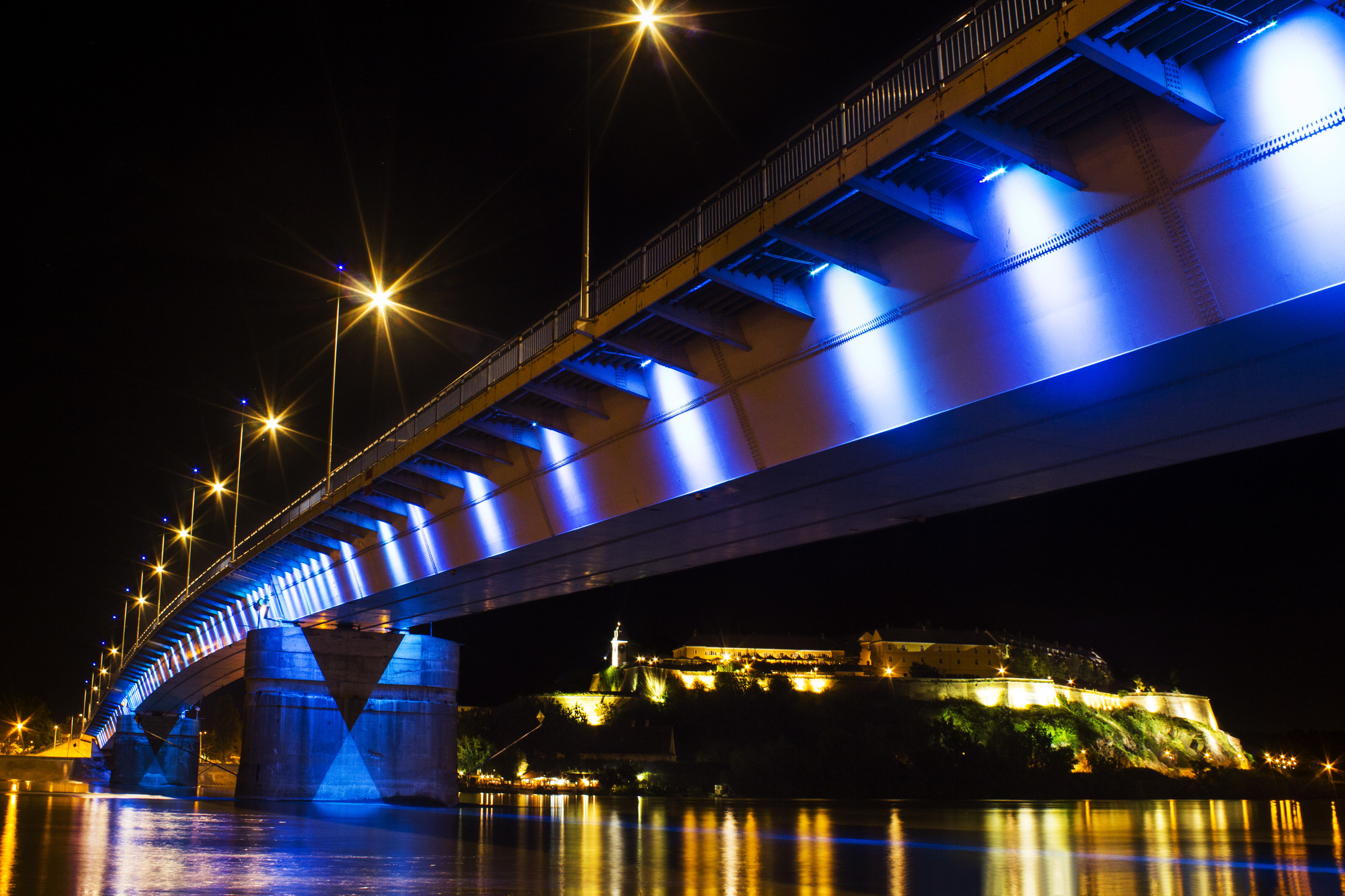 Pogled na staru tvrdjavu na obali reke Dunav u gradu Novom Sadu.Monumentalna gradjevina koja je nekada služila za odbranu od turskih osvajača danas je mesto održavanja festivala "Exit" jednog od najvećih festivala te vrste u svetu.